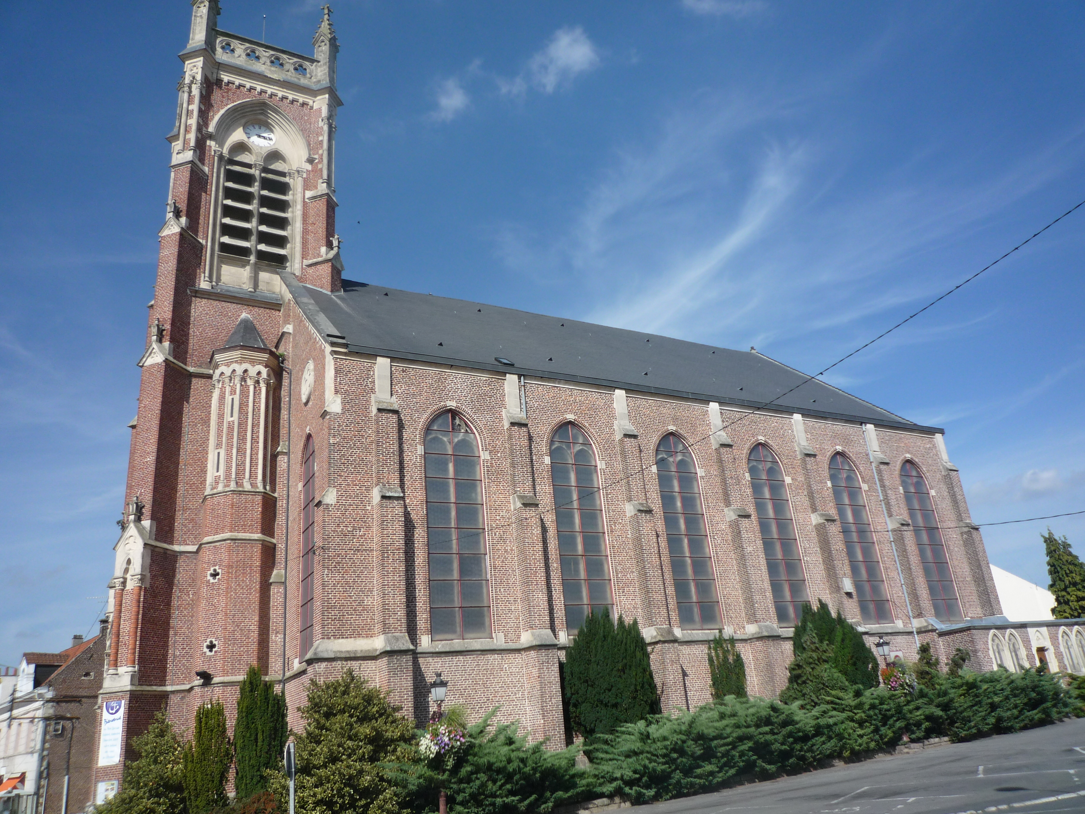 Église Saint-Martin d'Aniche, Nord, Nord-Pas-de-Calais, France.